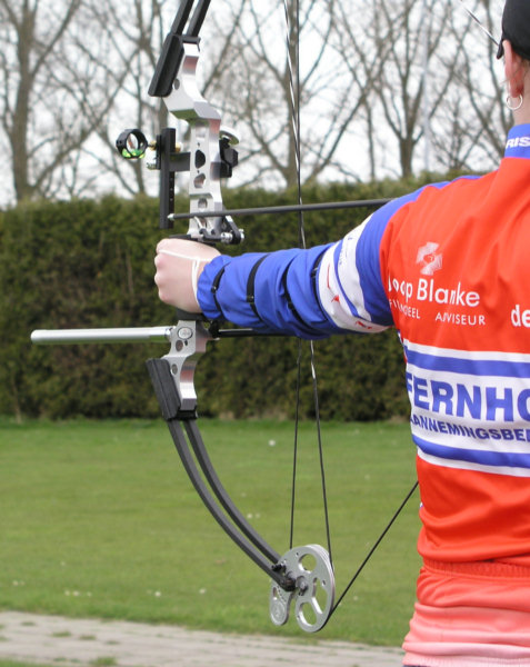 Het schieten met een compoundboog; let op de excentrische katrol Eigen foto E van Herk 2005 GNU FDL